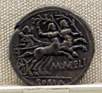 Palazzo Massimo alle Terme